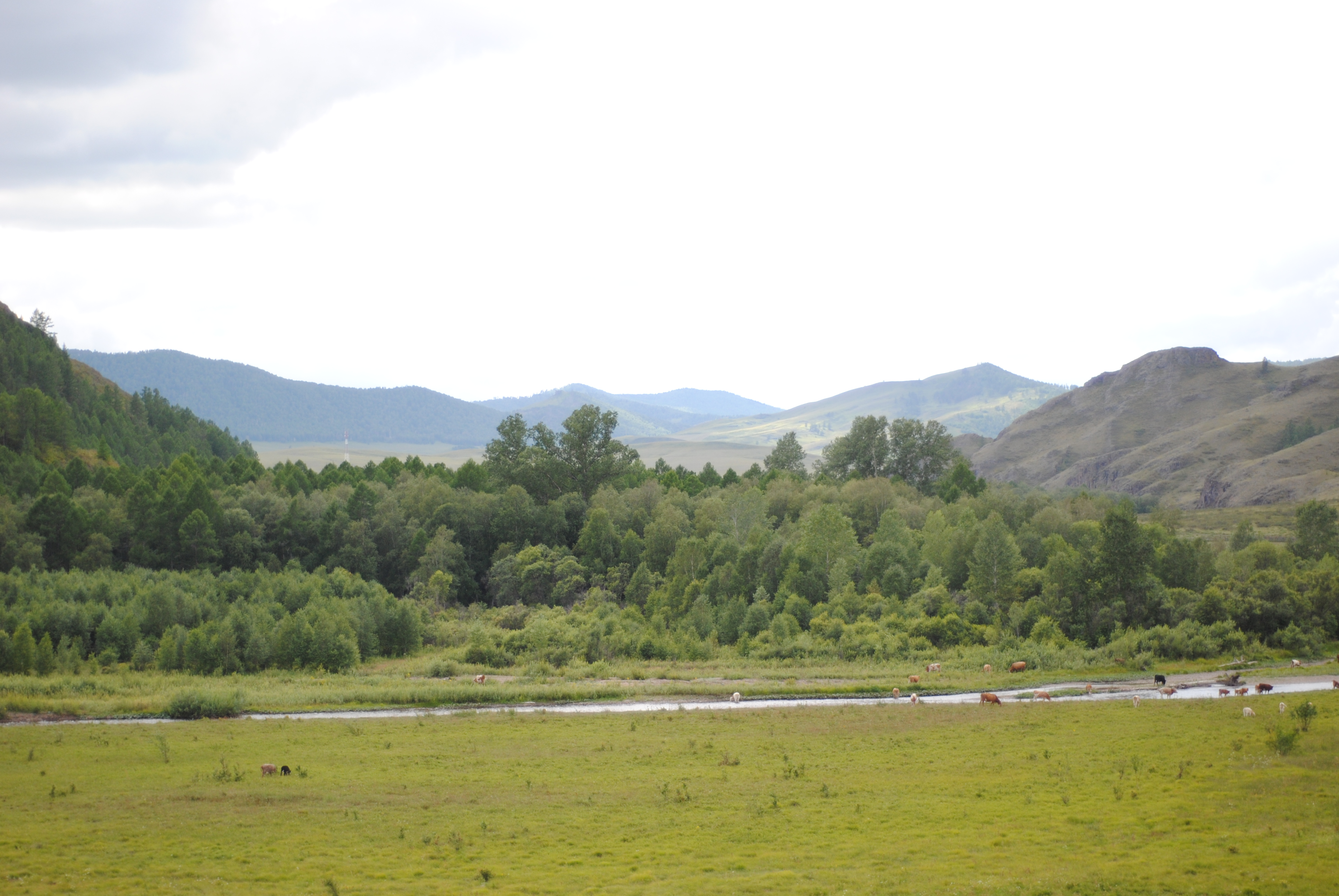 Казановка, Аскизский район This image is related to the protected area of Russia number 1910018